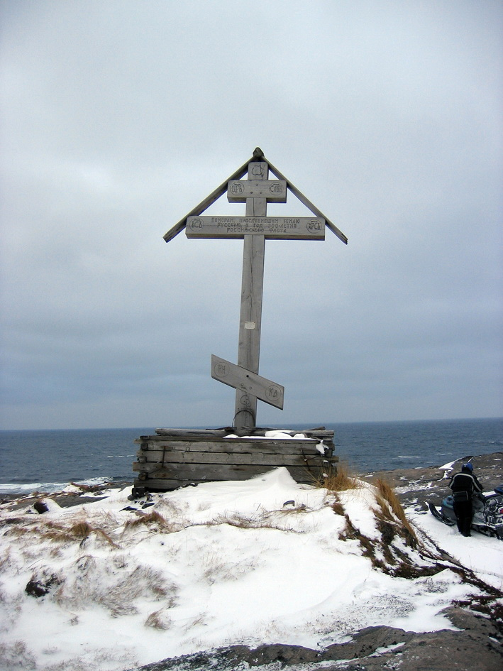 Крест на мысе Святой Нос